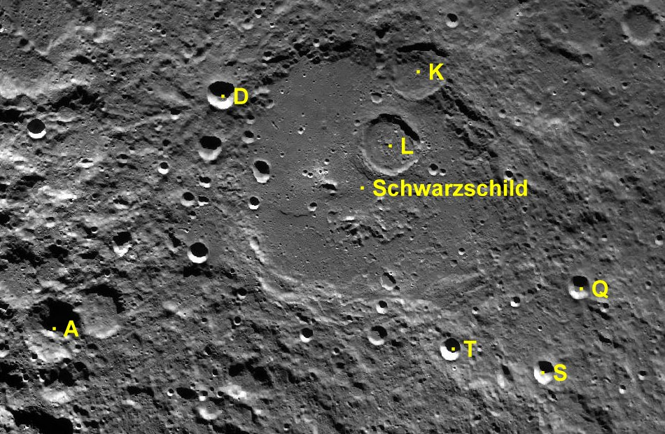 Cráter lunar Schwarzschild. Cráteres satélite (Imagen LRO)